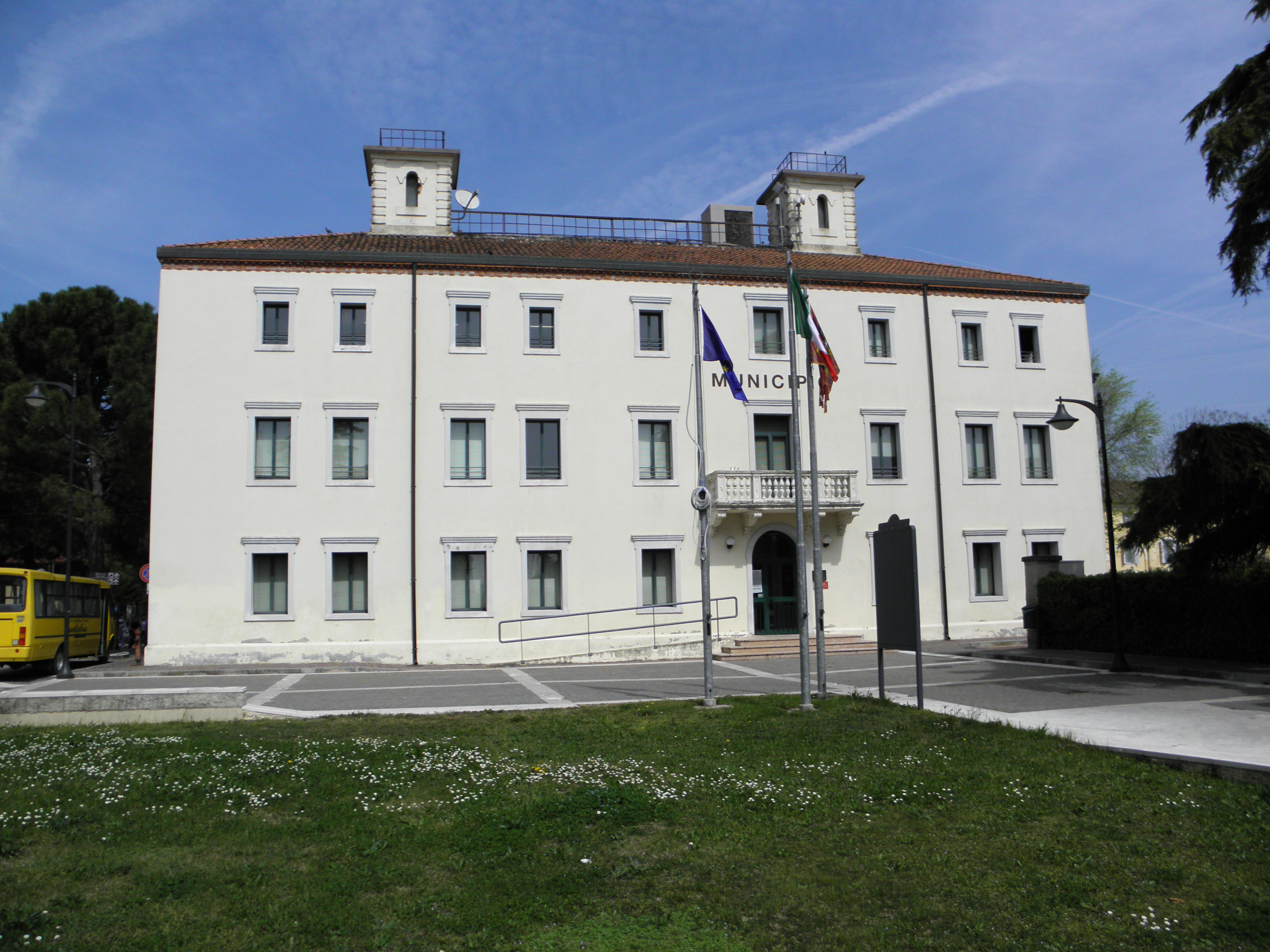 San Martino di Venezze: Palazzo Mangili-Valmarana ora sede municipale.